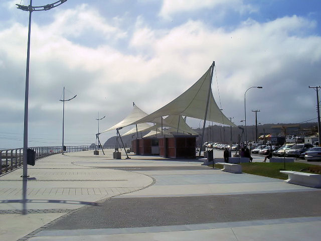 las ventanas